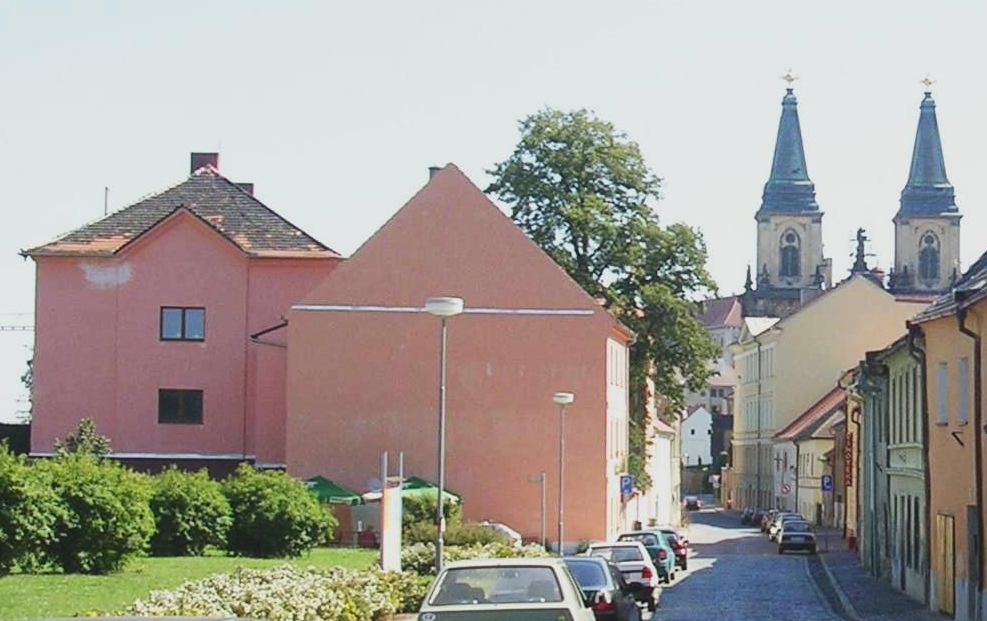 Někdejší synagoga je růžový dům úplně vlevo, vpravo je kostel Narození Panny Marie.